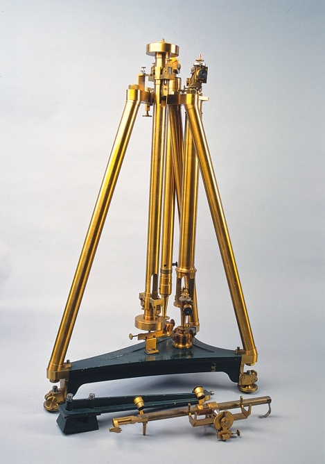 Péndulo de Barraquer.